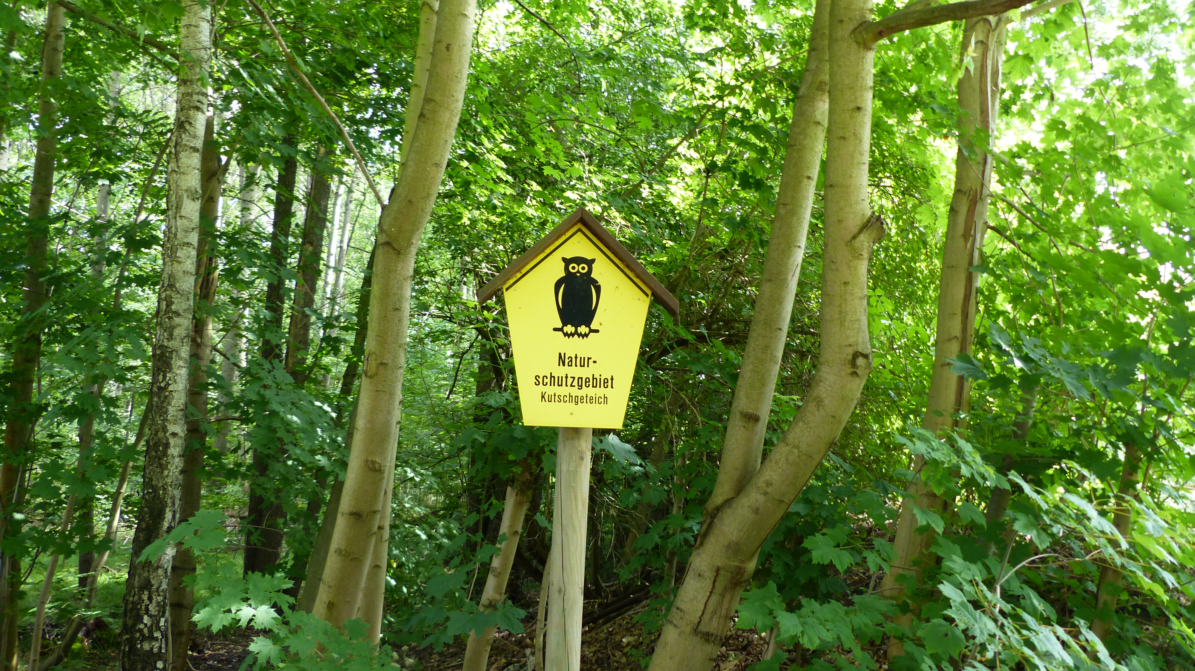 Naturschutzgebiet Kutschgeteich Moritzburg